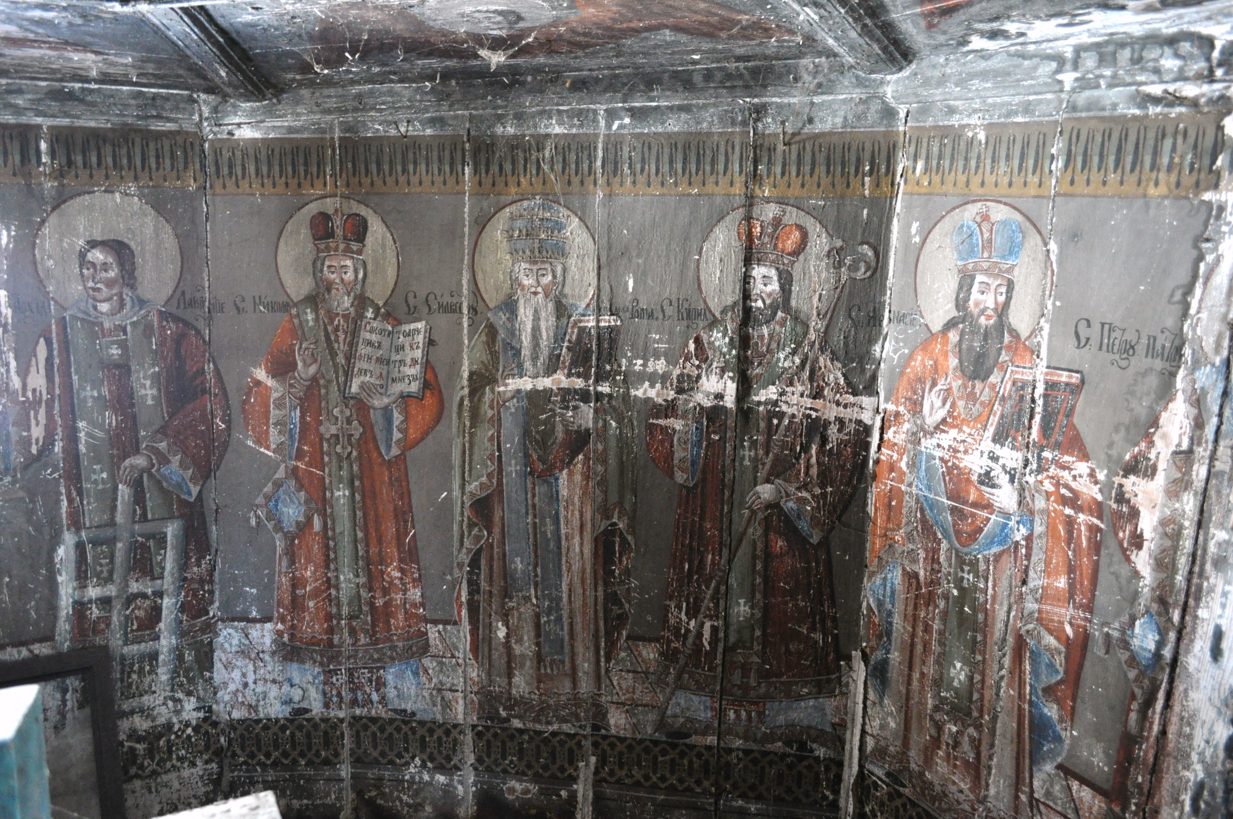 Biserica de lemn din Silivaș, județul Cluj